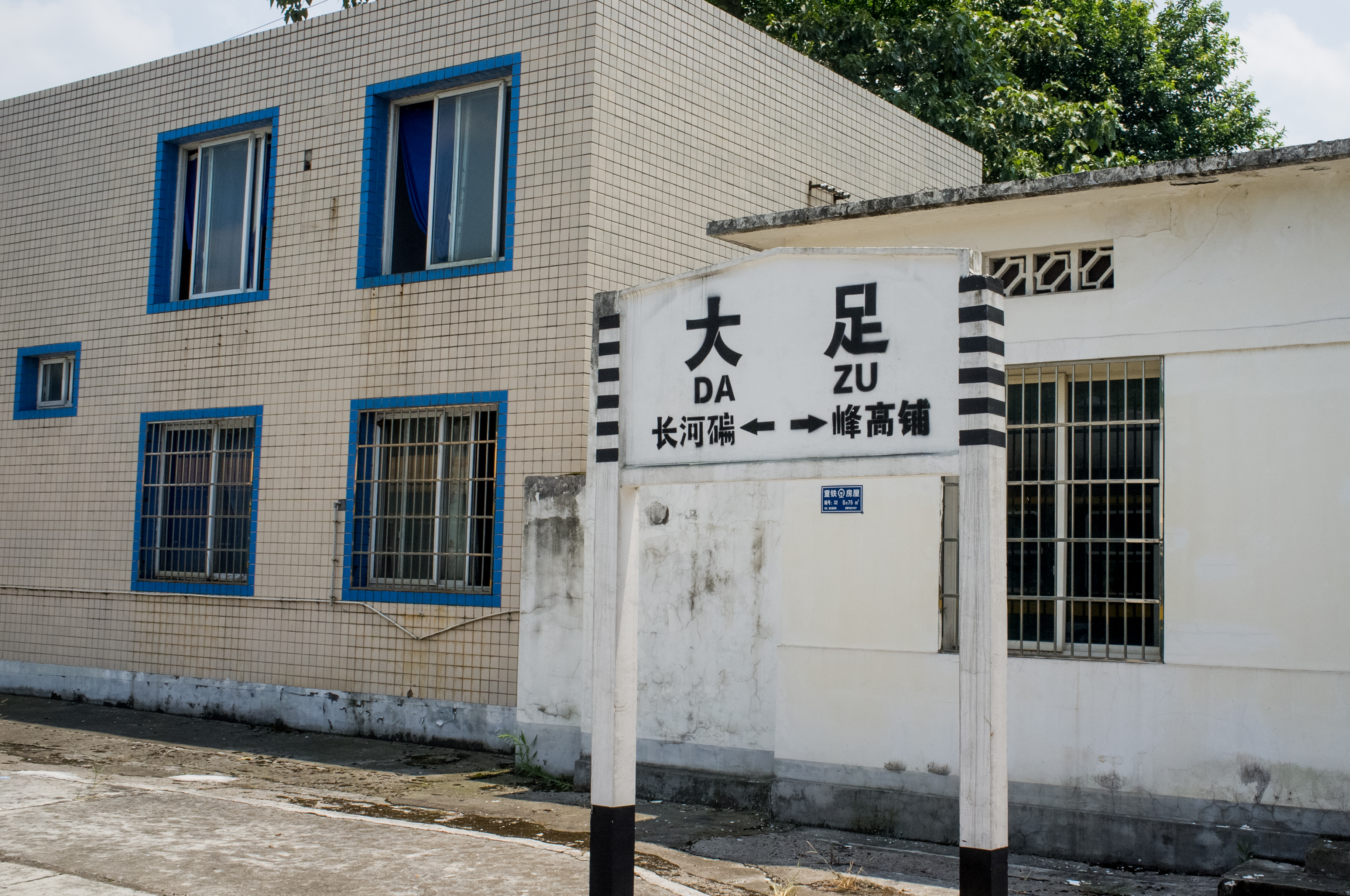 中文（中国大陆）: 成渝铁路大足站